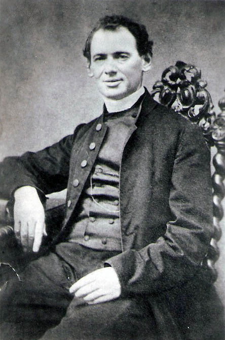 Robert Spiske (1821-1888) Domherr in Breslau, Gründer der Hedwigsschwestern